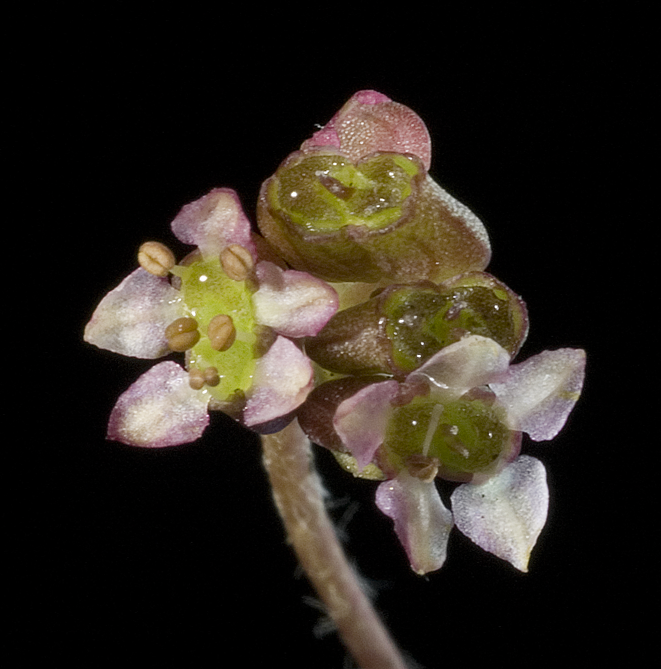 KRT3165